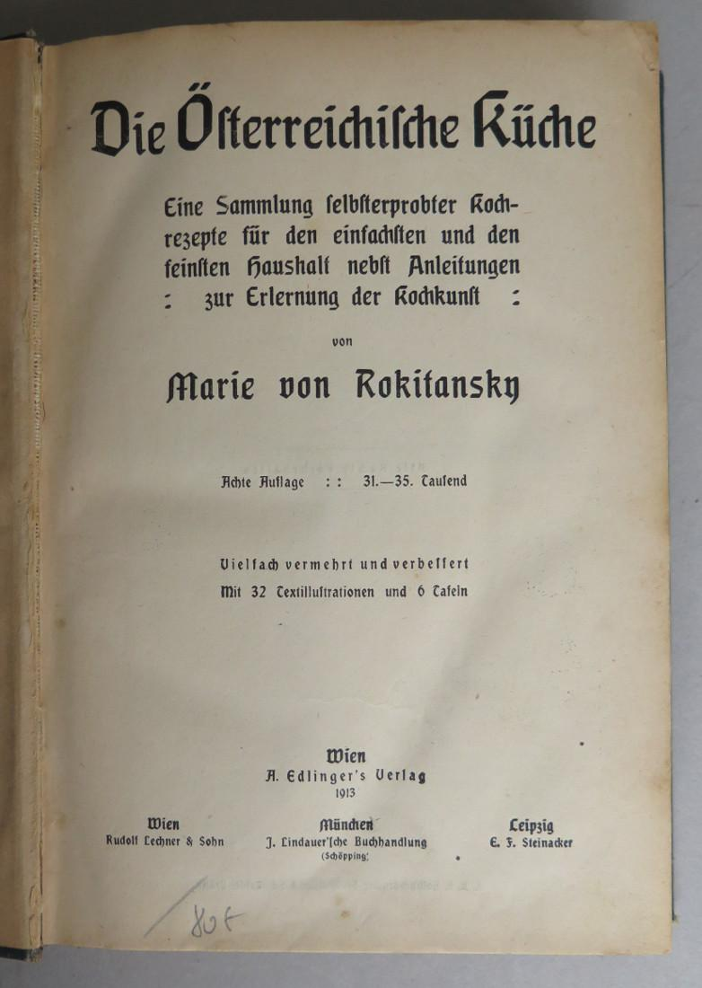 Marie von Rokitansky Die Österreichische Küche 1913 Titel